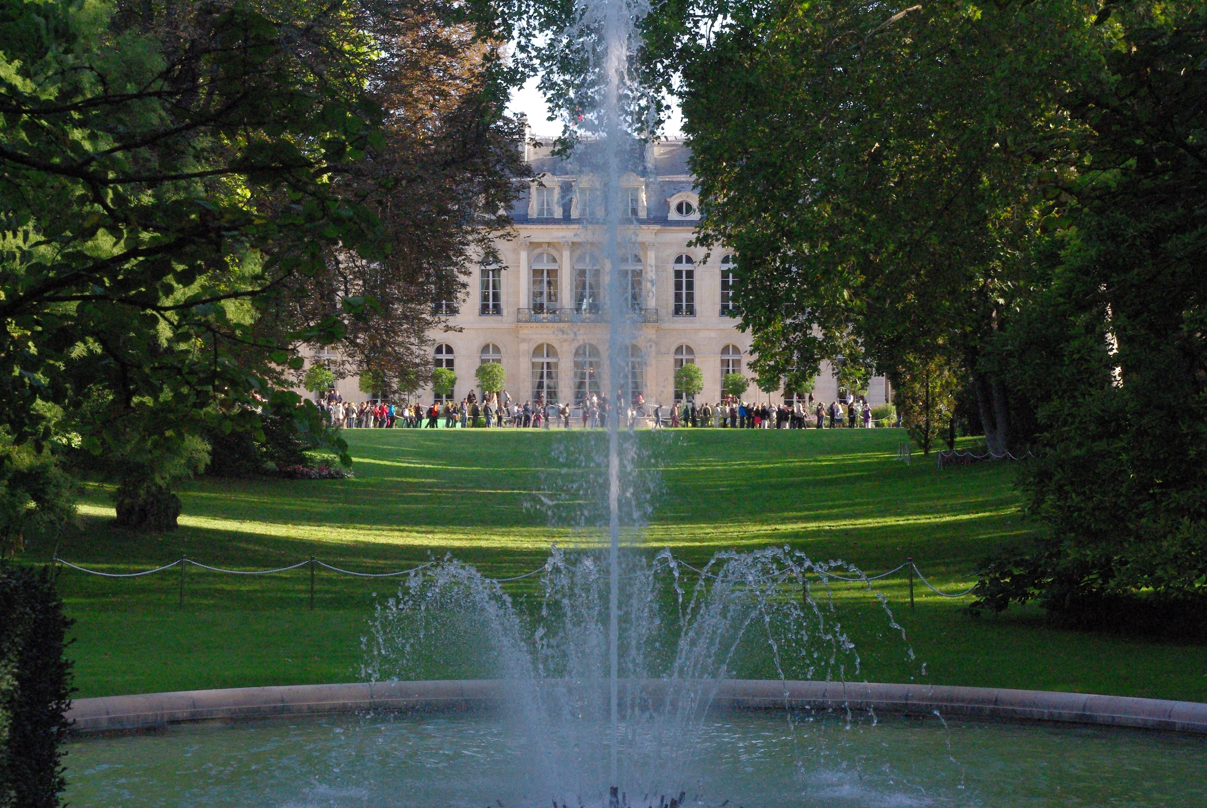 Vue du palais de l'Élysée depuis ses jardin